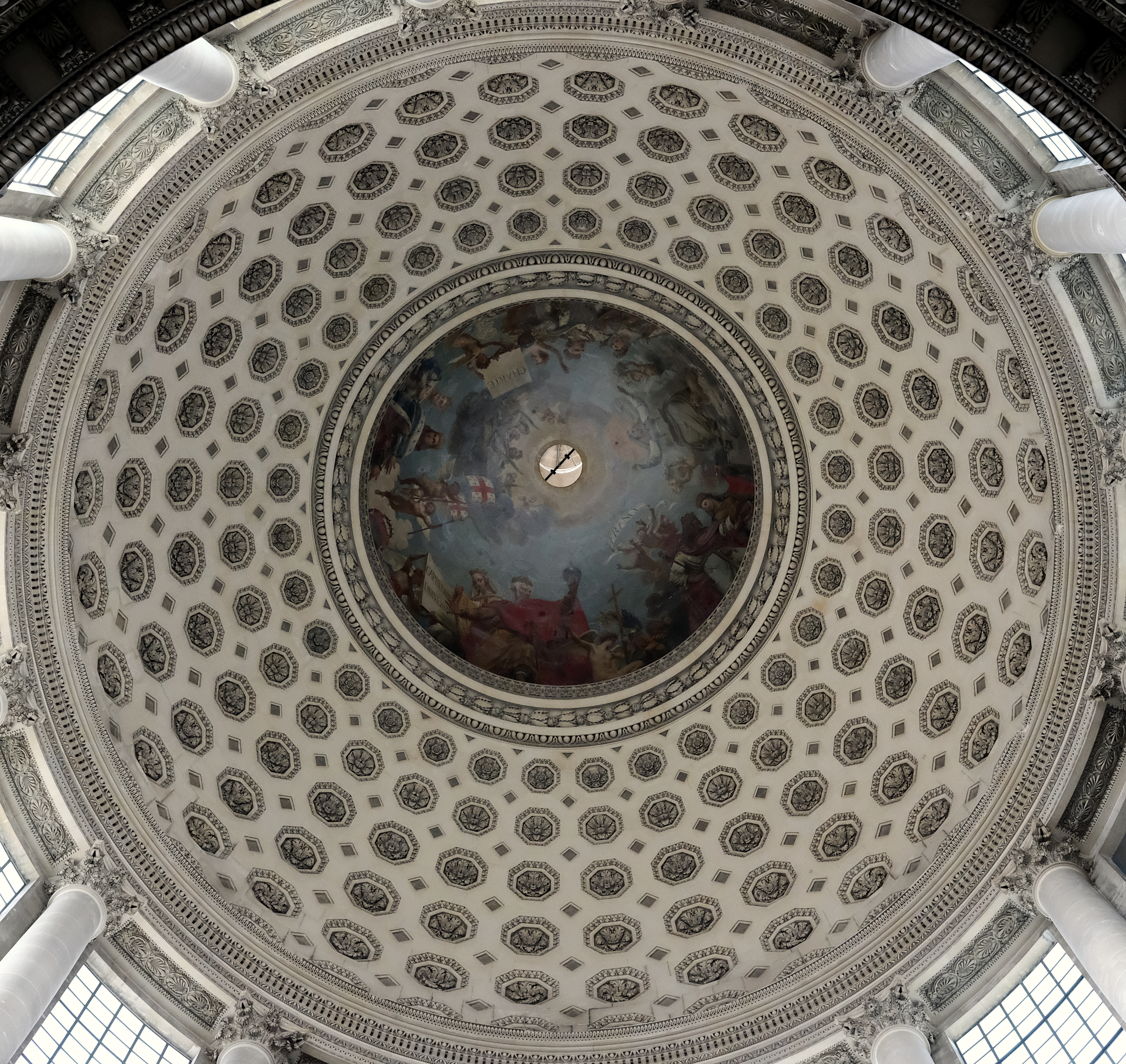 Paris V - Panthéon, coupole interne.